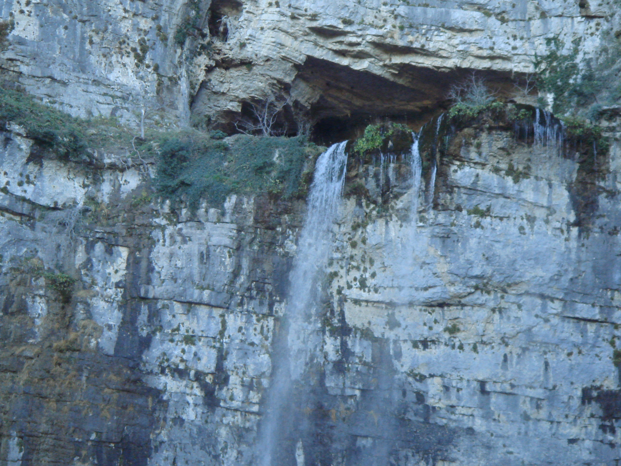 Nacimiento del Rio Mundo. Parque natural de los Calares del Mundo y de la Sima (Albacete).